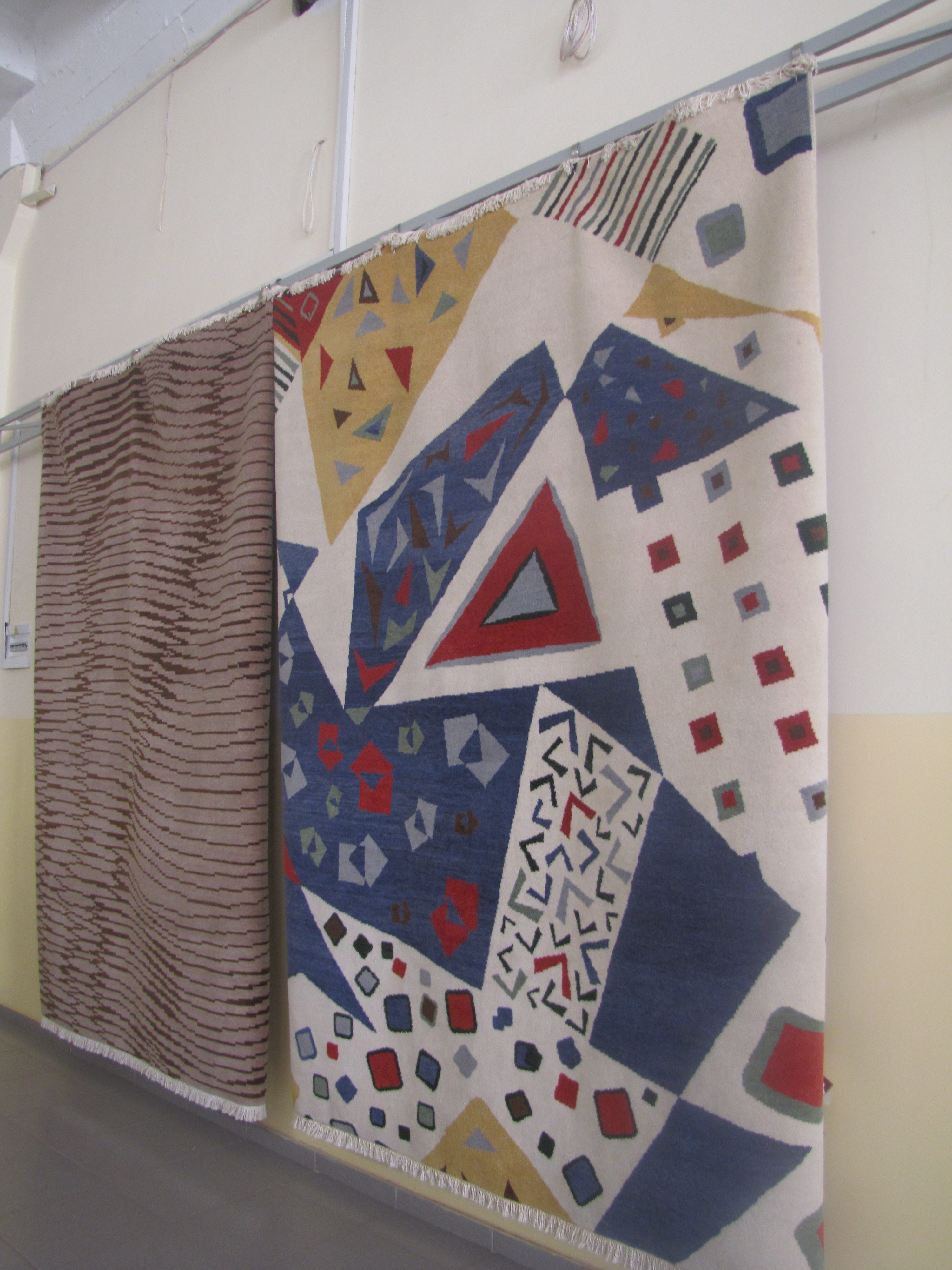 Ղարաբաղ կարպետ